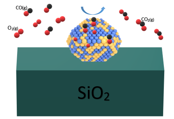 Schéma représentatif du processus d'oxydation de CO en CO2 à la surface des nanoparticules bimétalliques de AuPt immobillisées sur un support de silice (SiO2)